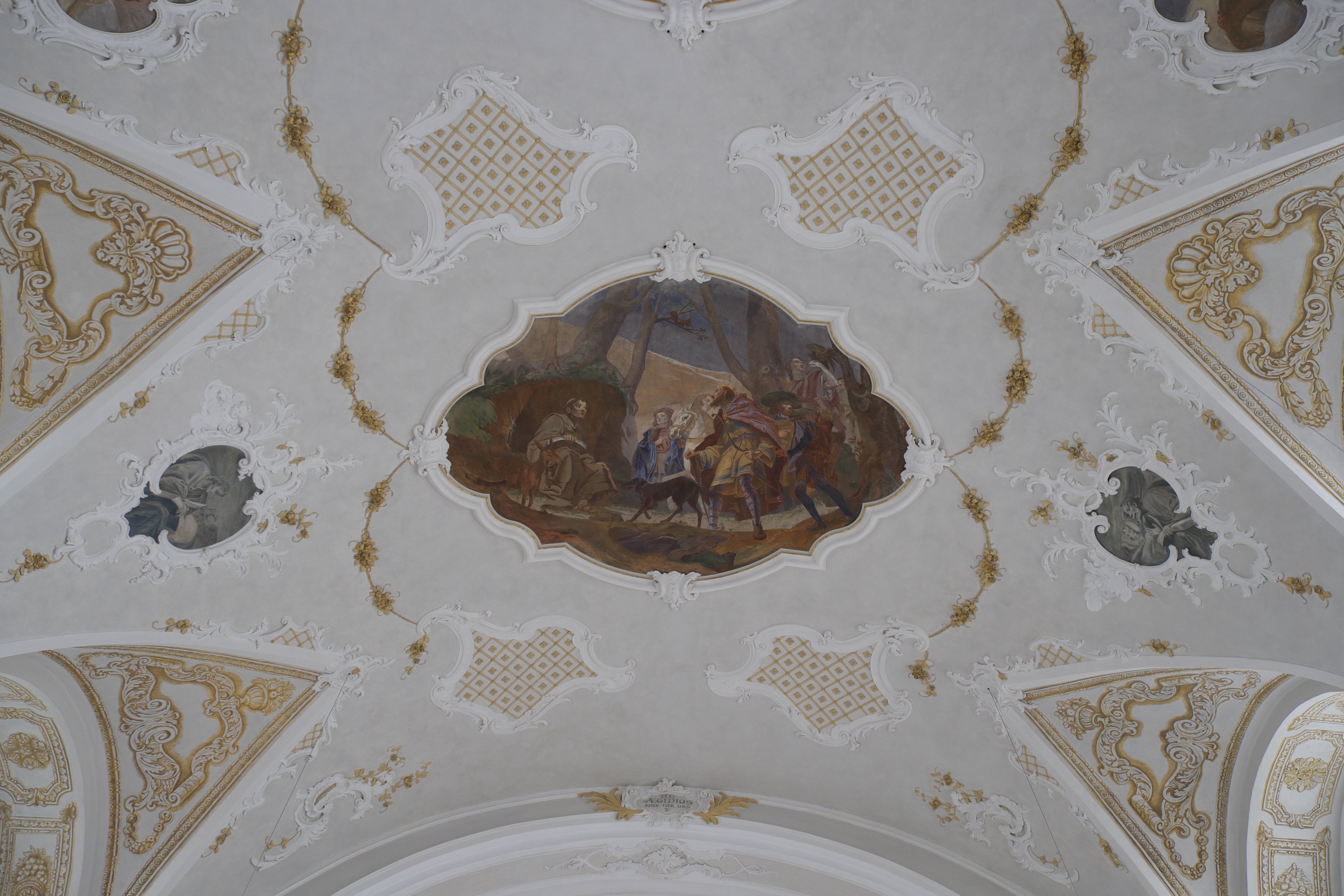 Katholische Pfarrkirche St. Ägidius in Grafing bei München im Landkreis Ebersberg (Bayern/Deutschland), Deckenfresko von J. Dasbourg, von 1915